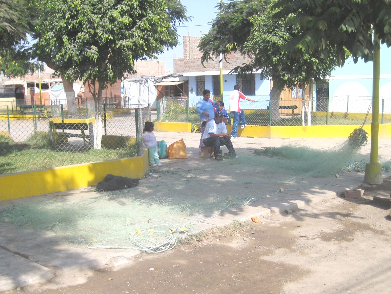 Pescadores artesanales tejiendo redes de pesca en la plazuela de Comatrana, ciudad de Ica en el Perú.